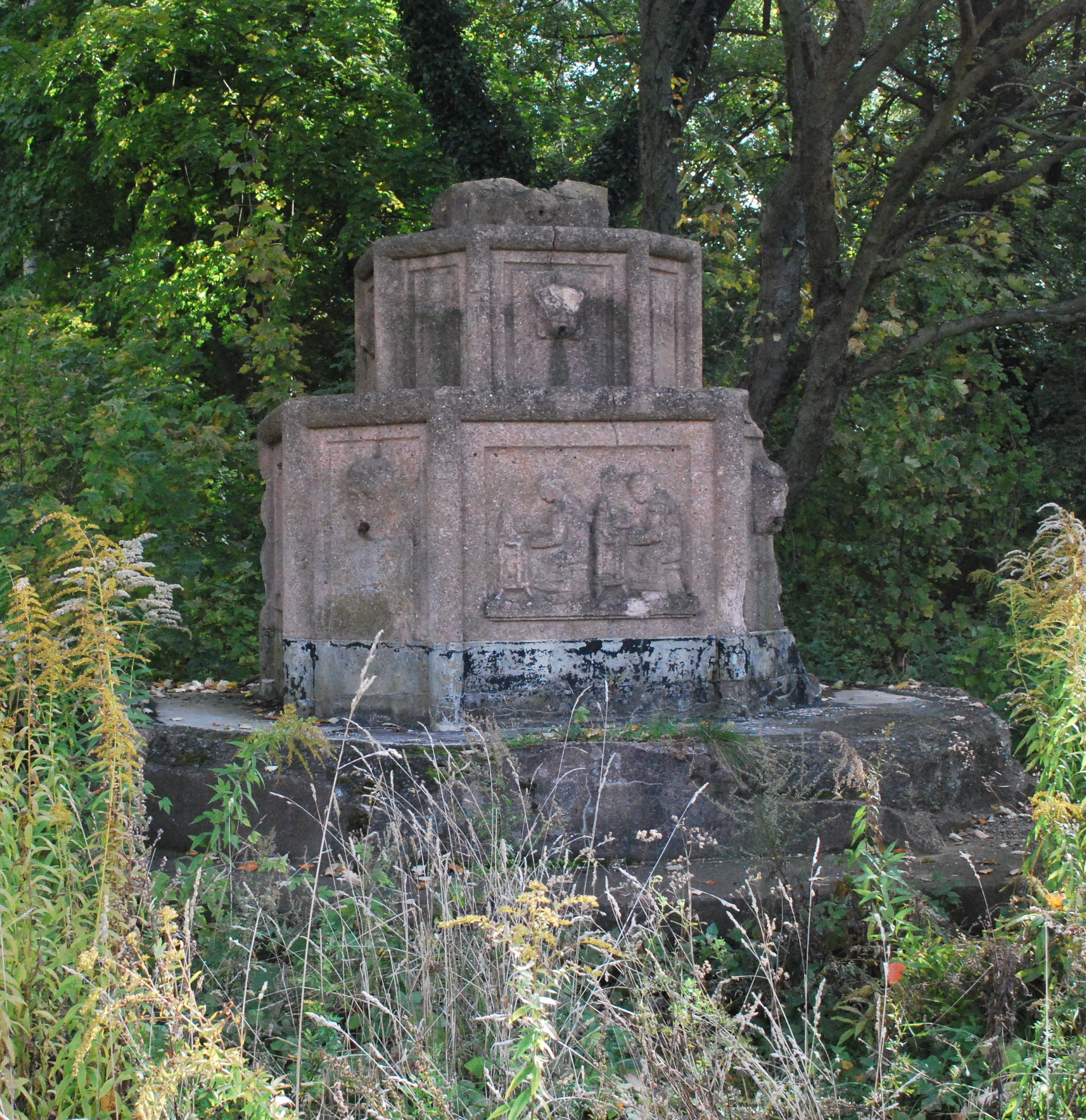 Tuchmacherbrunnen von Johannes Ernst Born auf dem ehemaligen Rathenauplatz in Forst (Lausitz), heute in Polen, entstanden 1922/23 anlässlich des Neubaus der Langen Brücke über die Lausitzer Neiße und der Neugestaltung der beiden angrenzenden Plätze durch Rudolf Kühn